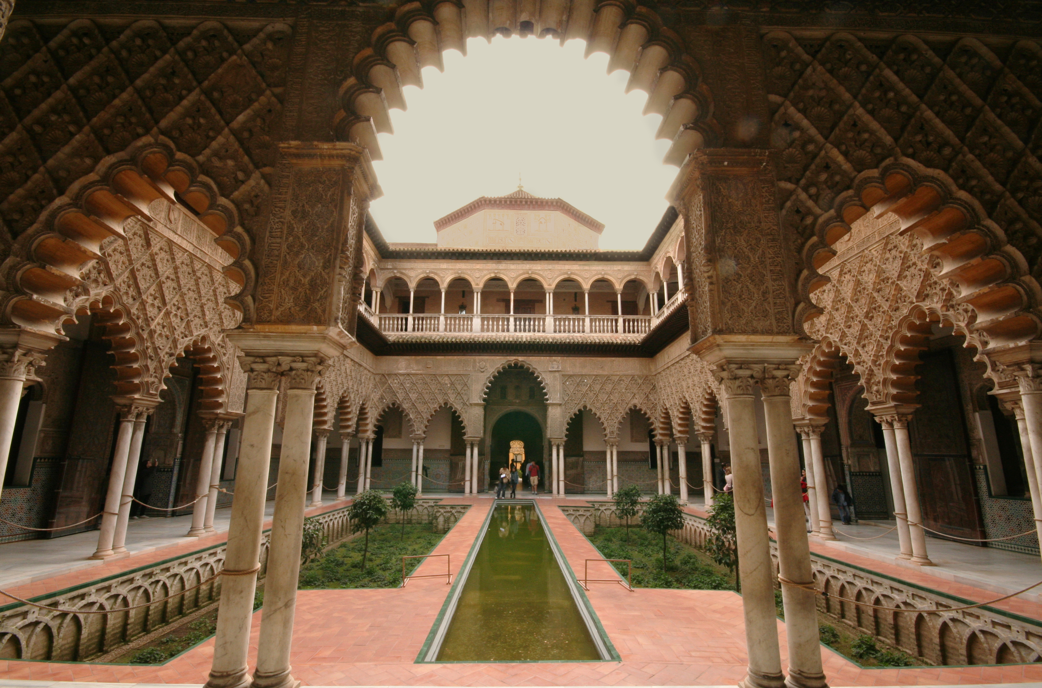 En el Real Alcázar de Sevilla. Más Mudéjar, columnas, arcos lobulados, escritura cúfica, agua, simetría, simplemente precioso. --- In the Real Alcázar, in Seville. More Mudejar style, columns, cusped arches, Kufic script, water, symmetry, simply beautiful.